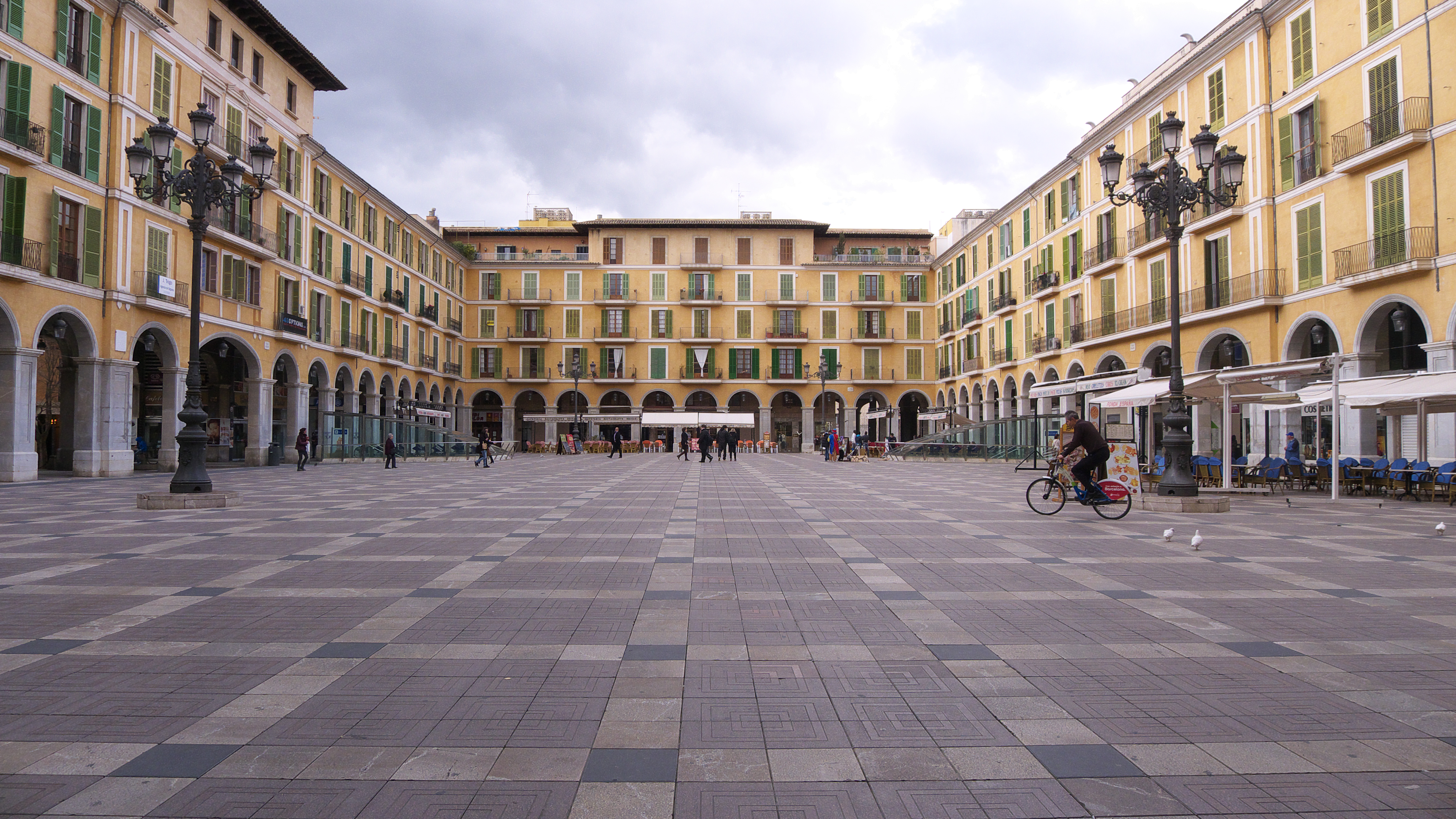 El proyecto comienza sobre 1838 dilatándose hasta el siglo XX